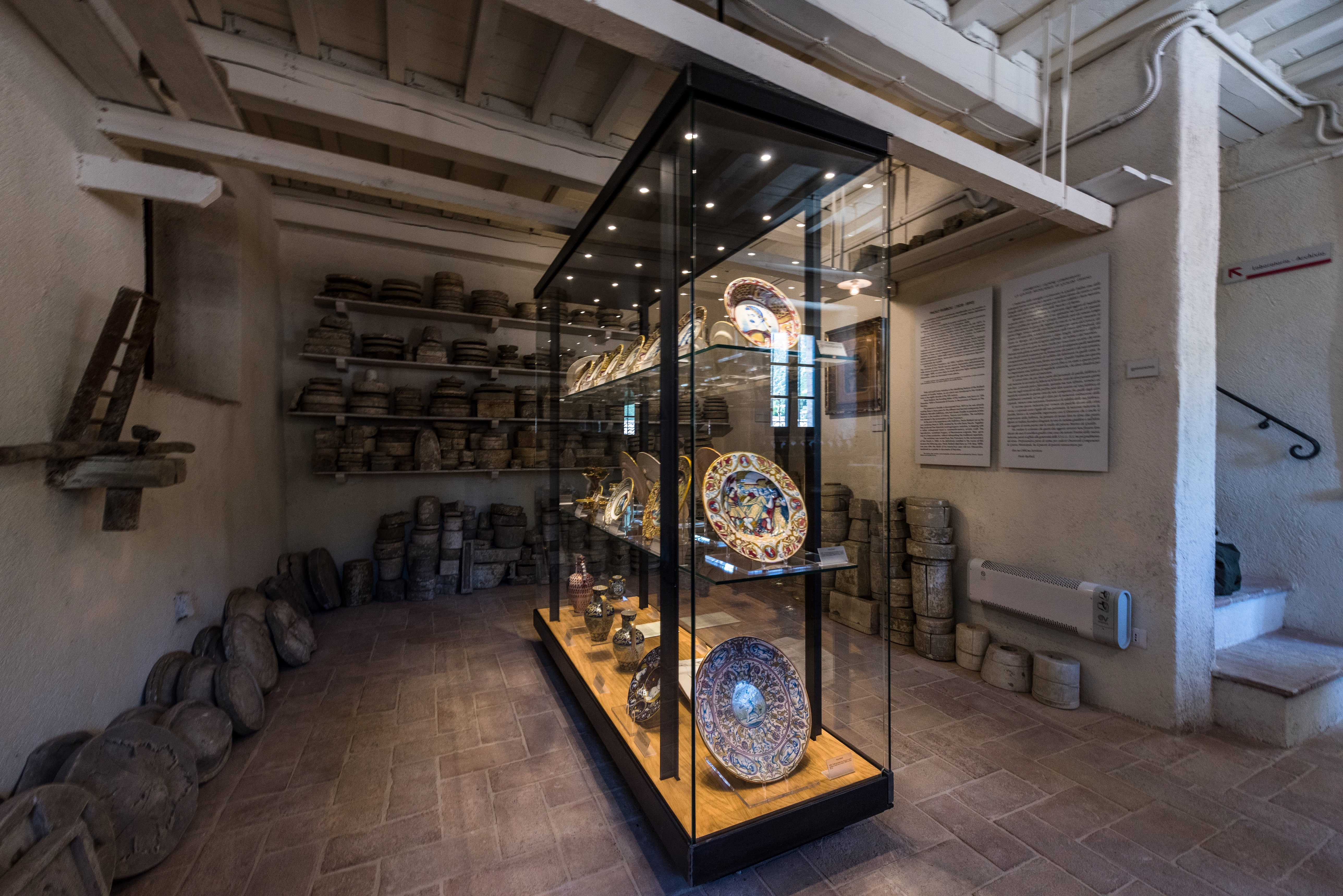 Prima sala espositiva del Museo Opificio Rubboli dedicata alla figura di Paolo Rubboli